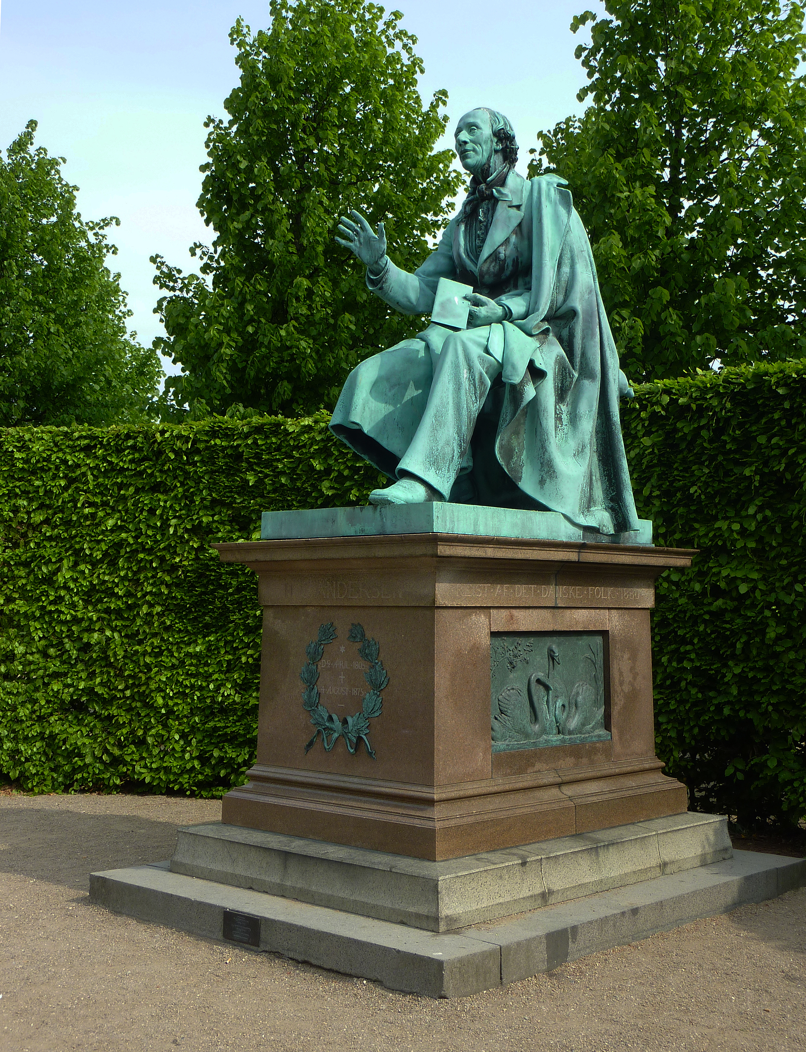 Hans Christian Andersen statue in Rosenborg Castle Garden in Copenhagen, Denmark